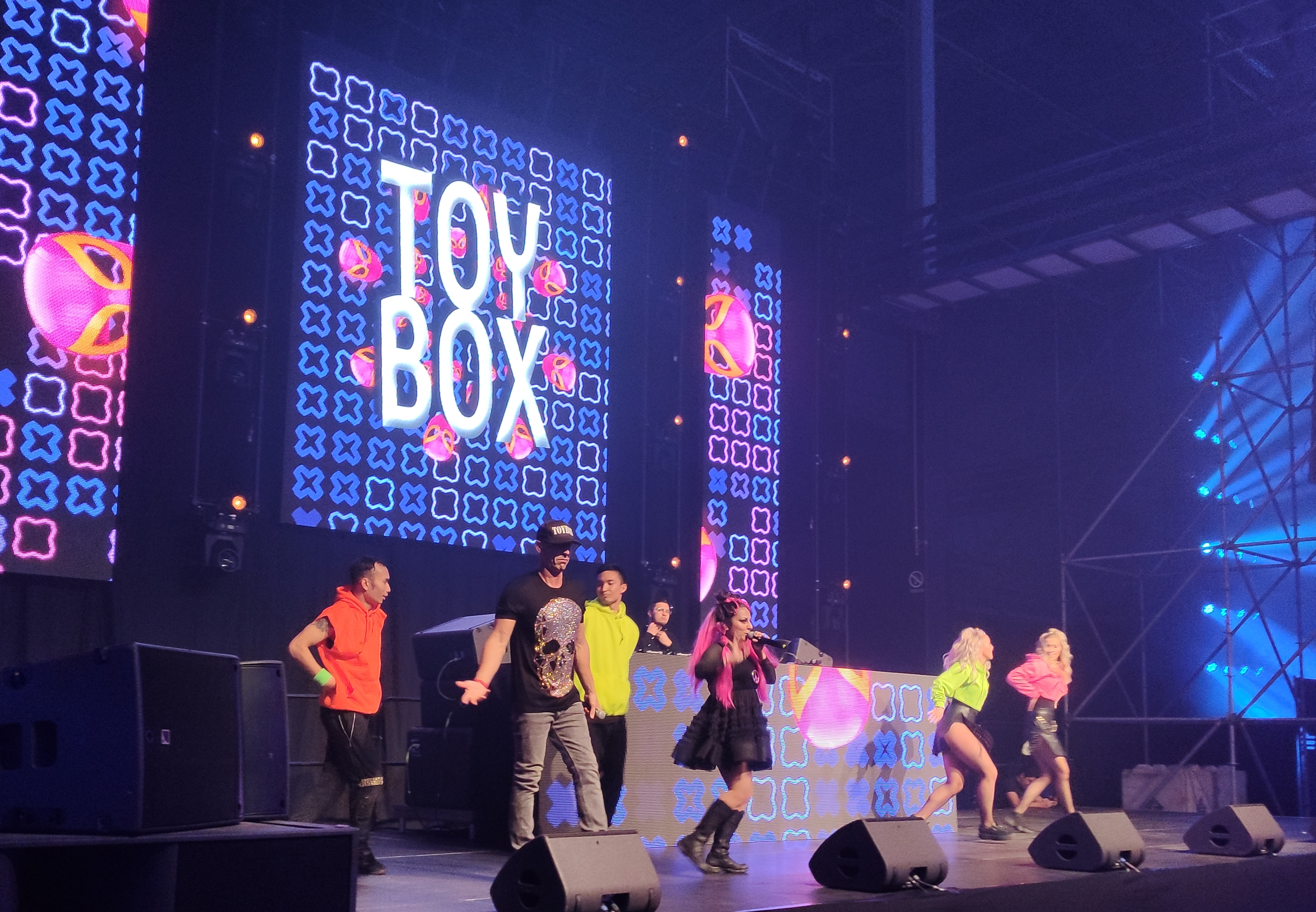 Toy-Box tijdens een optreden tijdens het Foute Festijn in de Evenementenhal te Gorinchem (2019)